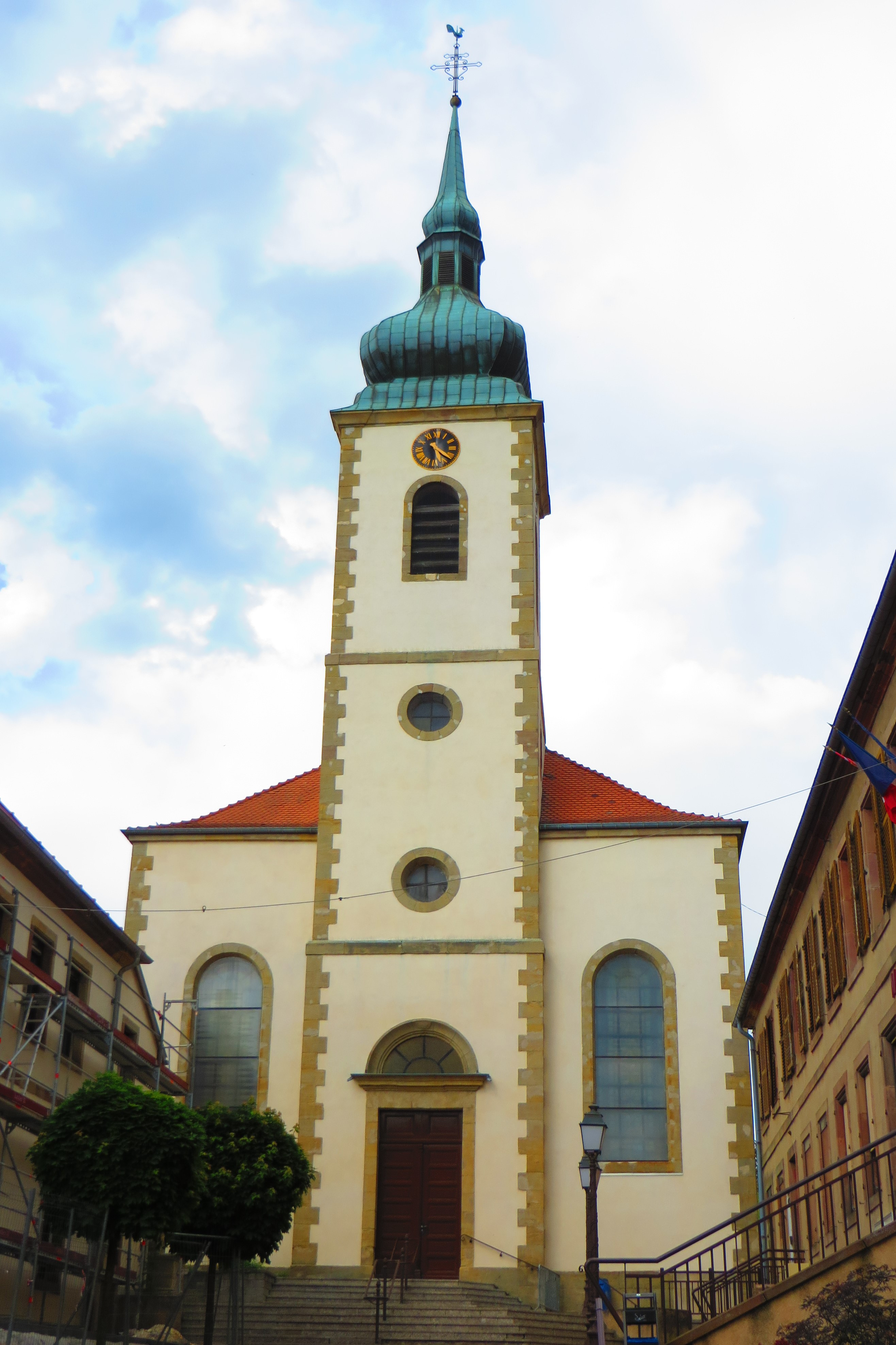 Diebling Église Saint-Wendelin